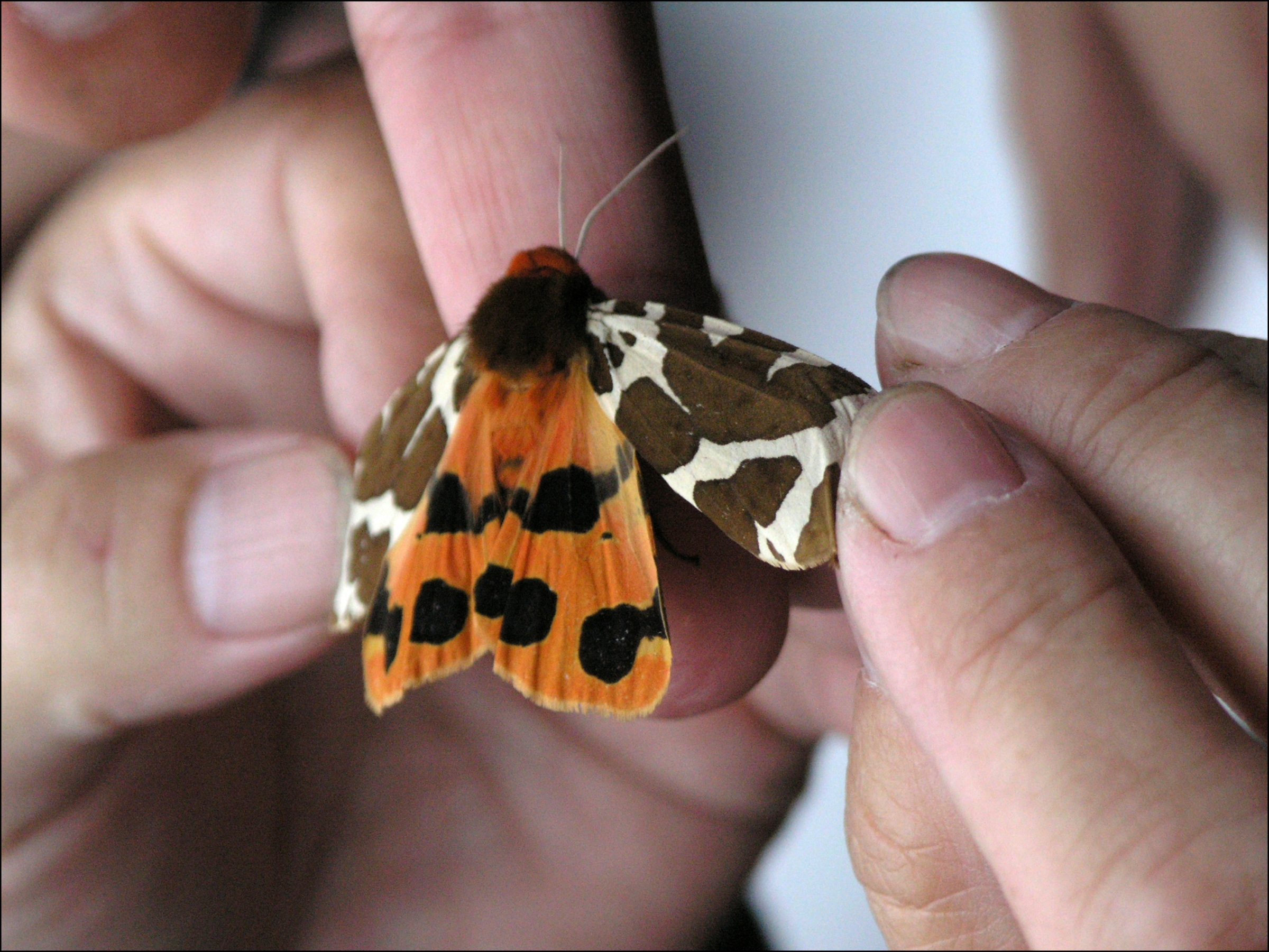 Přástevník medvědí (Arctia caja)